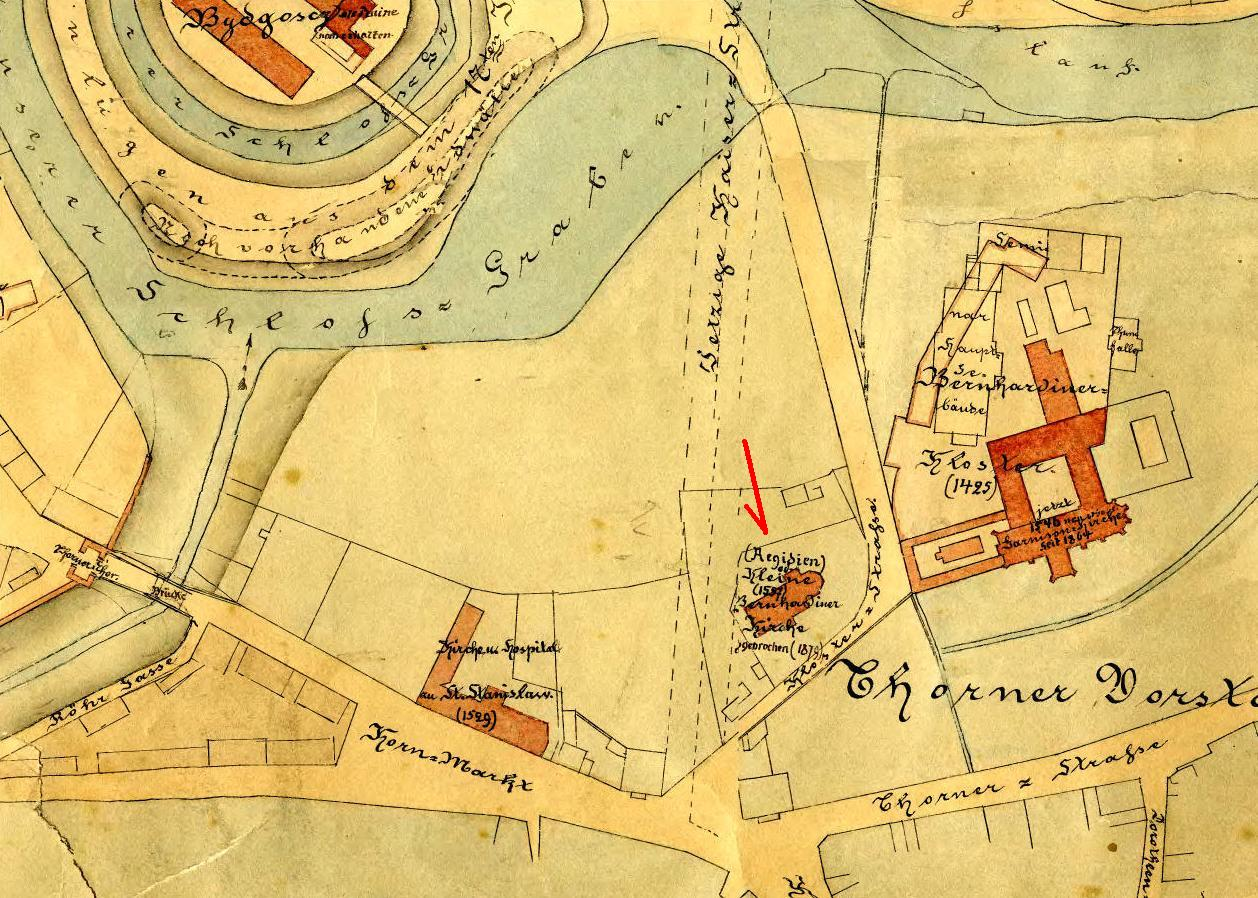 Lageplan der Stadt und Burg Bromberg (Bydgoszcz) mit ihren im 16, 17 und 18 Jahrhundert vorhandenen Bauanlagen. Nach alten Karten, den noch heute erhaltenen Ueberresten der Bauwerke und örtlichen Ermittelungen angefertigt für den hiesigen historischen Verein im Jahre 1890. Lokalizacja kościoła św. Idziego